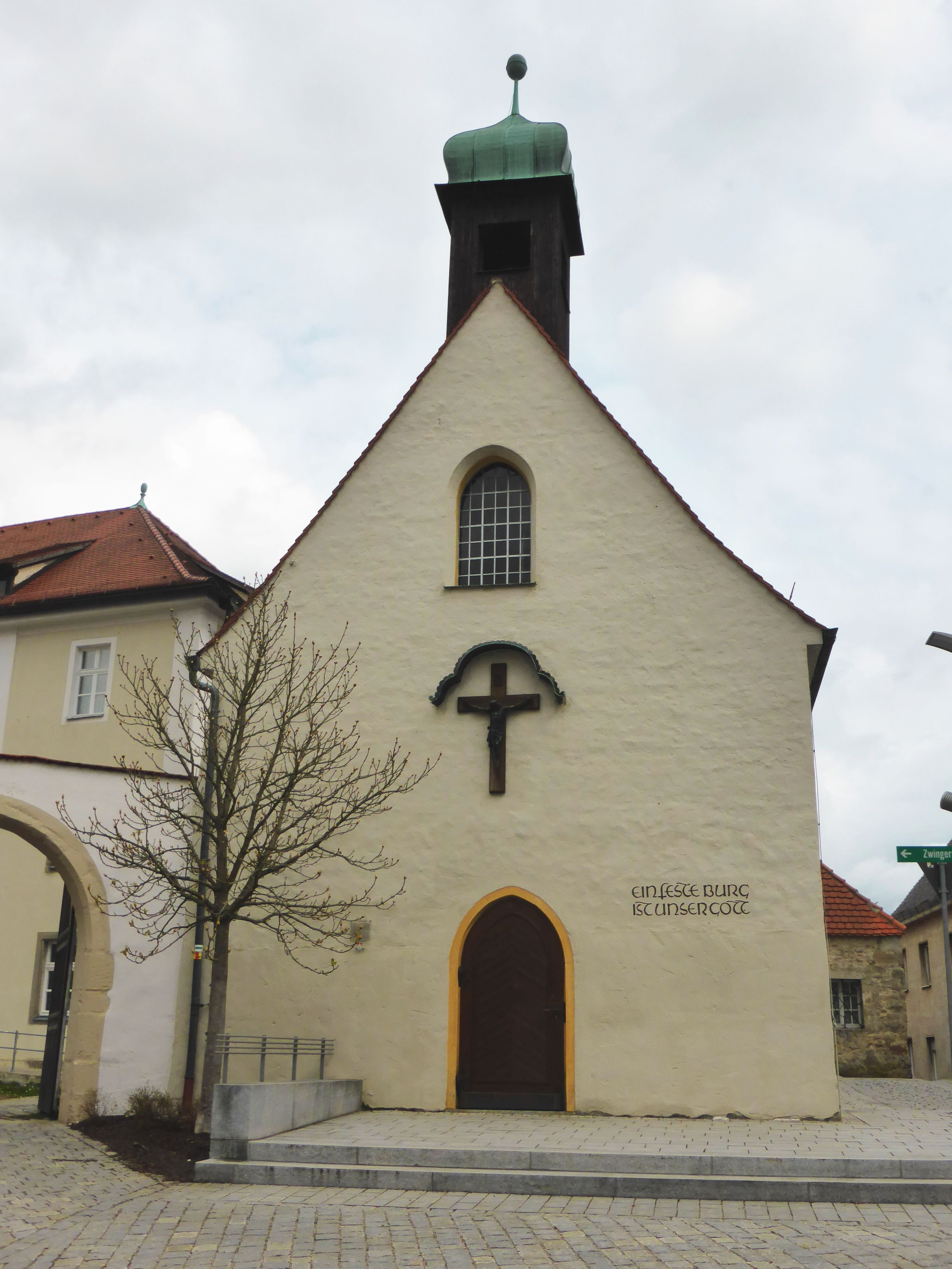 Nabburg (Obertor 8) Laurentiuskirche